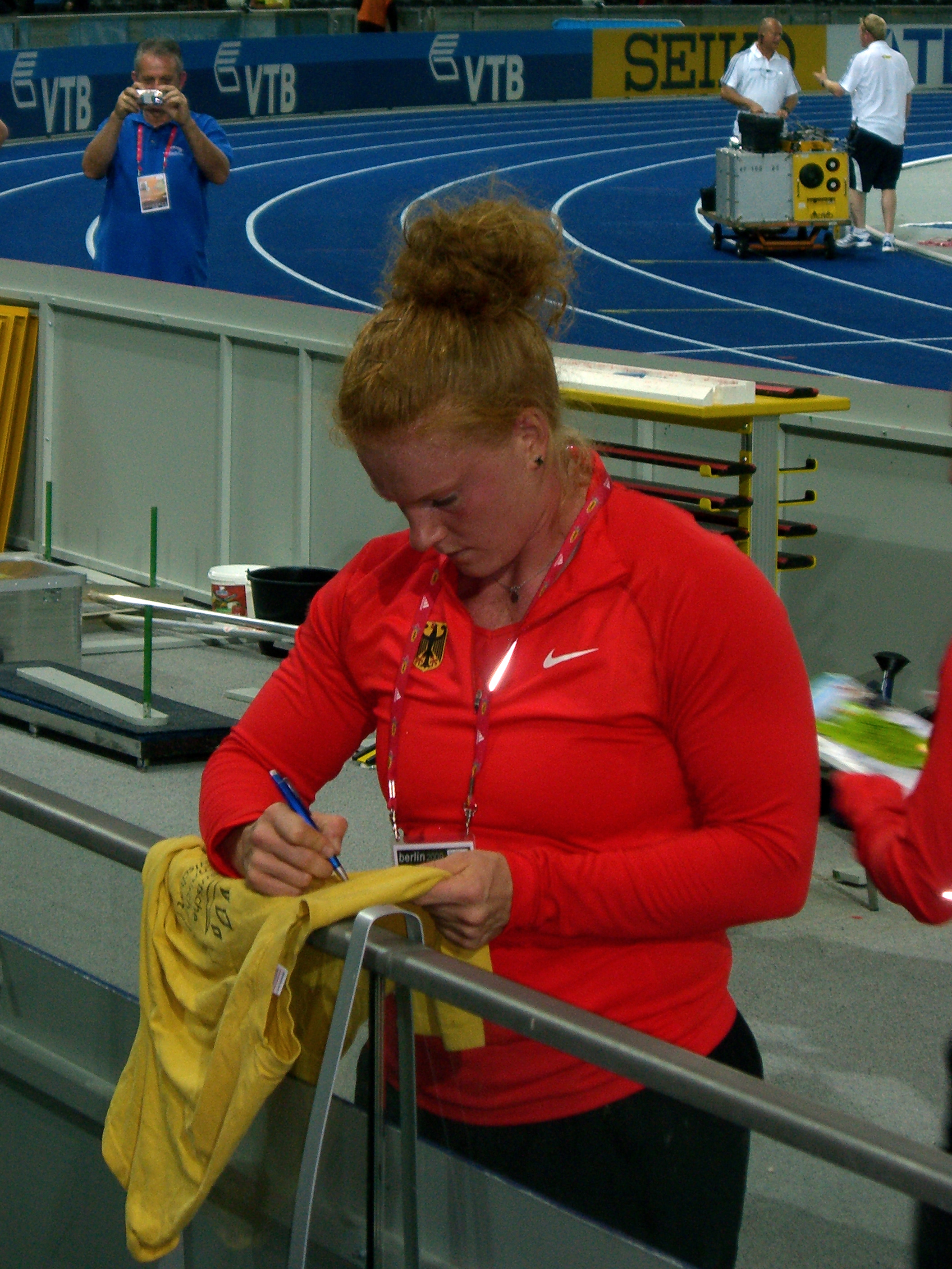 Leichtathletik Weltmeisterschaft, Berlin 2009, Betty Heidler nach dem Gewinn der Silbermedaille im Hammerwurf der Frauen.